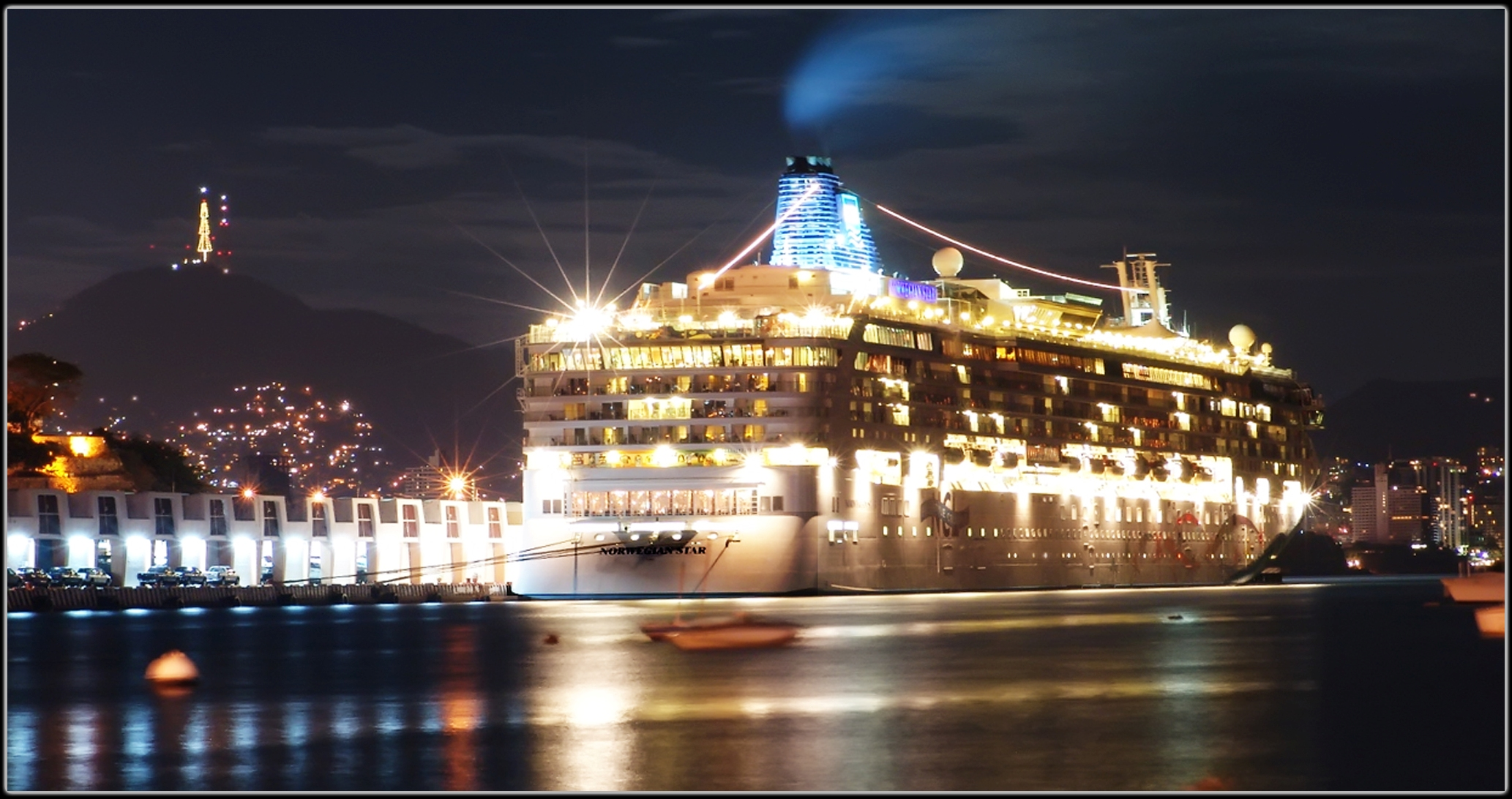 (Descripción original en Flickr): En Navidad 07